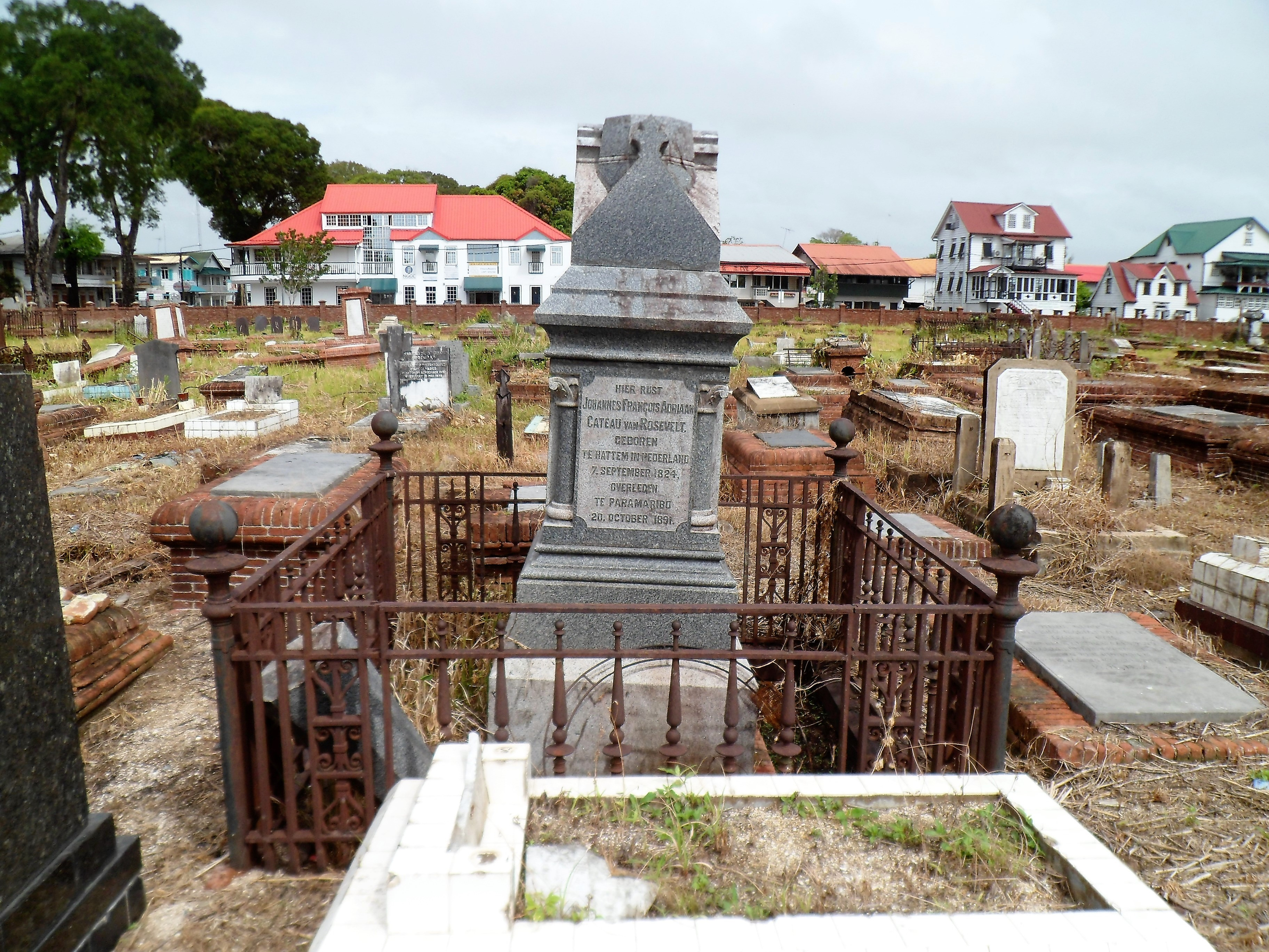 Grabmonument Cateau van Rosevelt auf dem Friedhof Nieuwe Oranjetuin in Paramaribo, Suriname